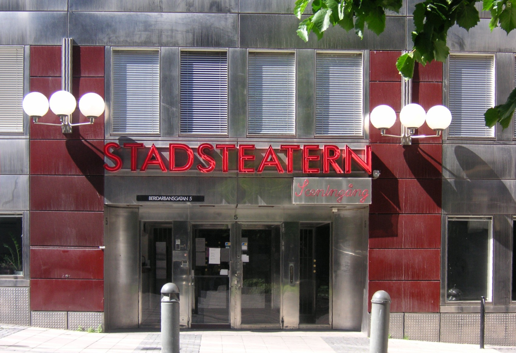 Stockholms Stadsteater, sceningången